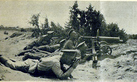 Пулемёт Максима в действии (1916-1917), Русский фронт